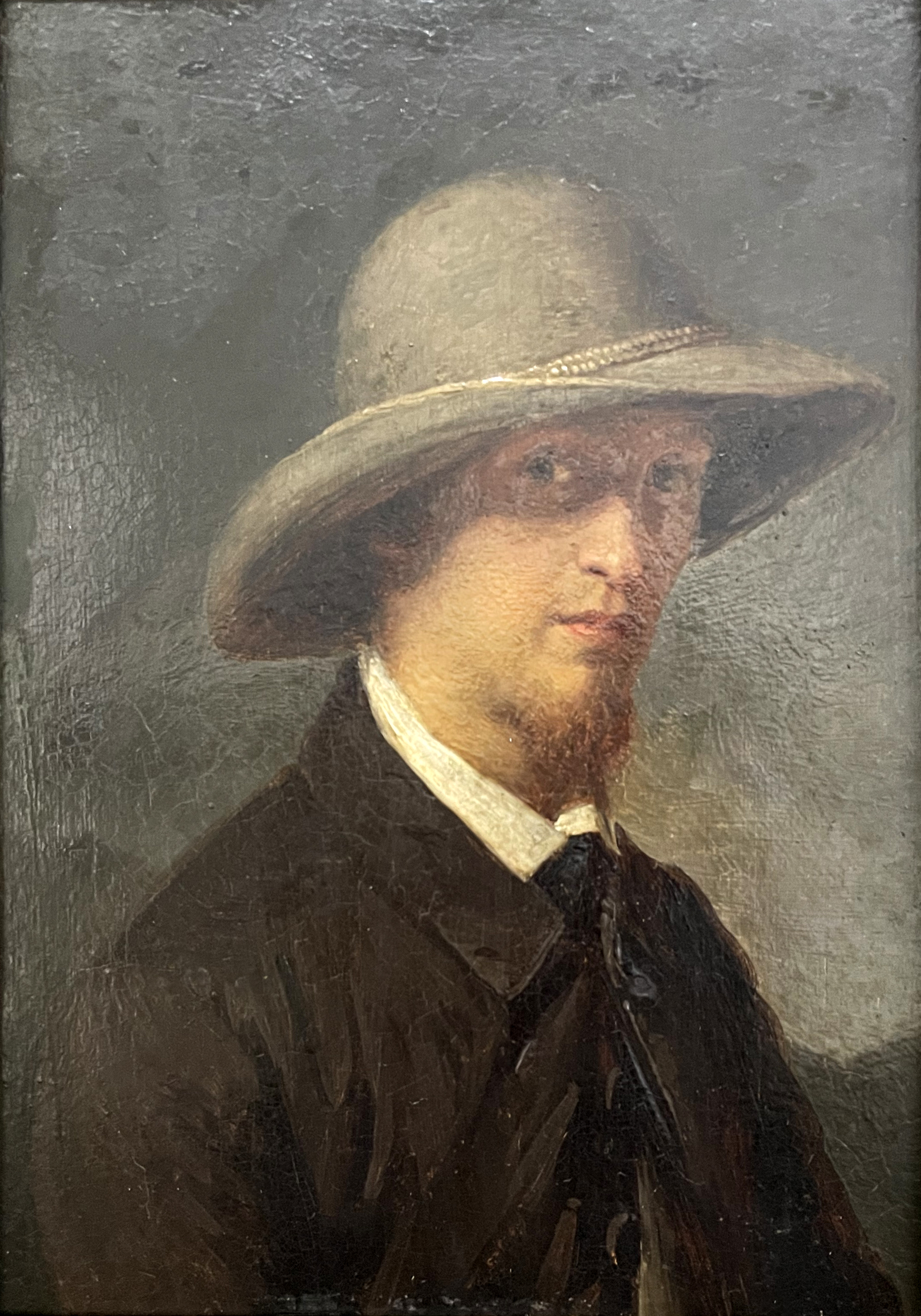 10 Leu Prf. - Porträt August Leu (1818–1897) - in Freundschaftsgalerie von Einzelbildnissen der Düsseldorfer Malerschüler und ihren Freunden (Vermächtnis des Künstlers)